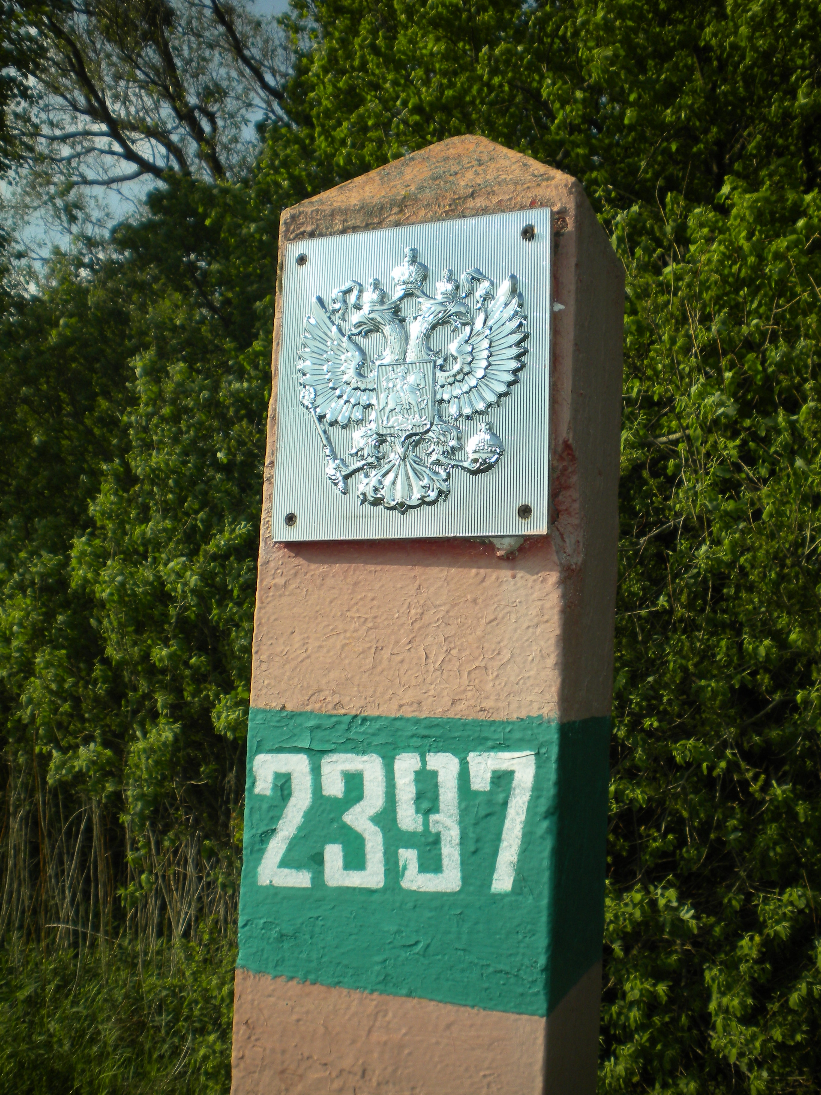 Reliefschild einer russischen Grenzsäule an der polnisch-russischen Grenze nahe Pęciszewo deutsch Waltersdorf in der Woiwodschaft Ermland-Masuren ehemalig Ostpreußen aufgenommen am 10. Mai 2012